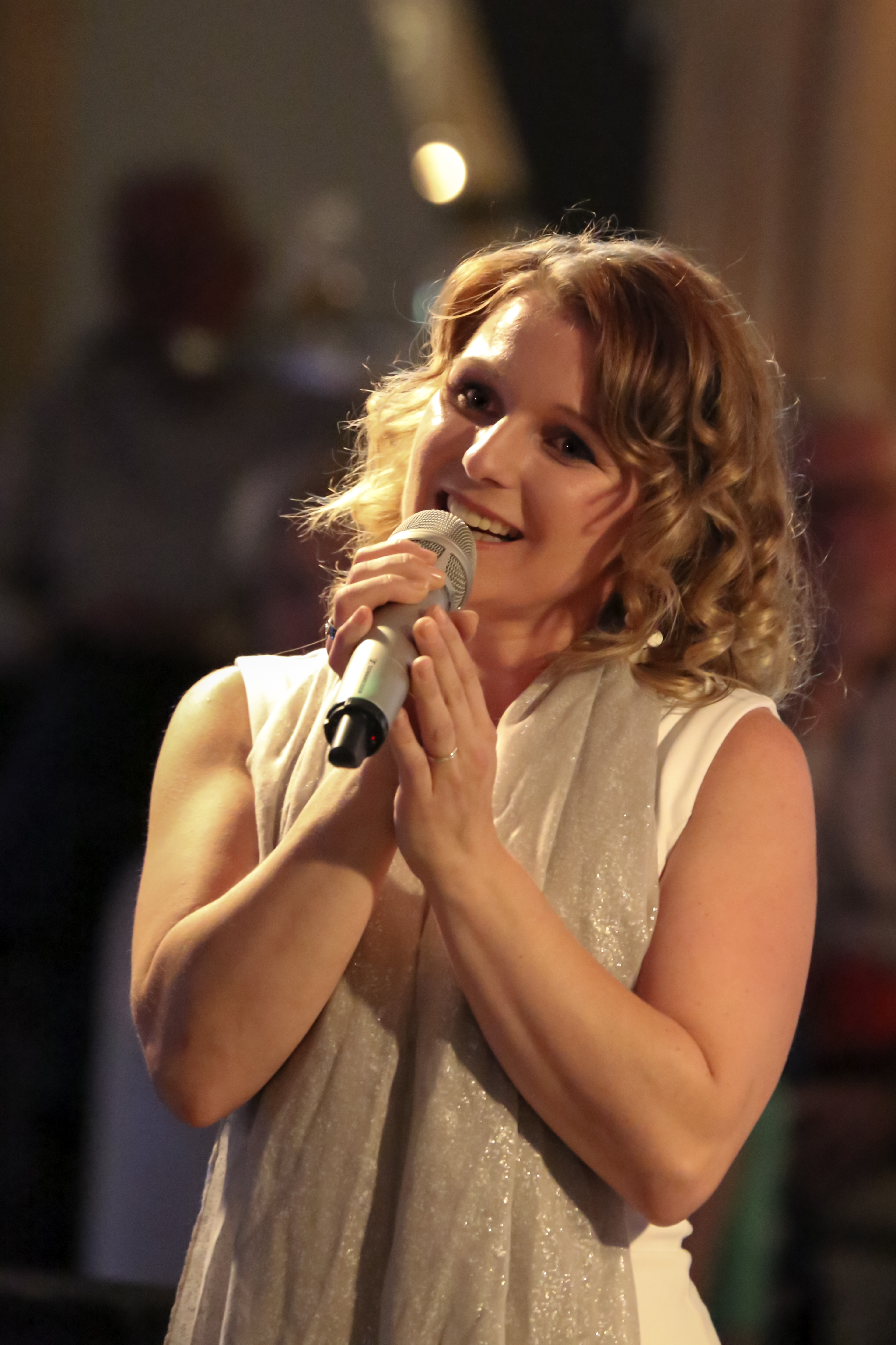 Nadine Sieben bei einem Konzert in Travemünde 2017